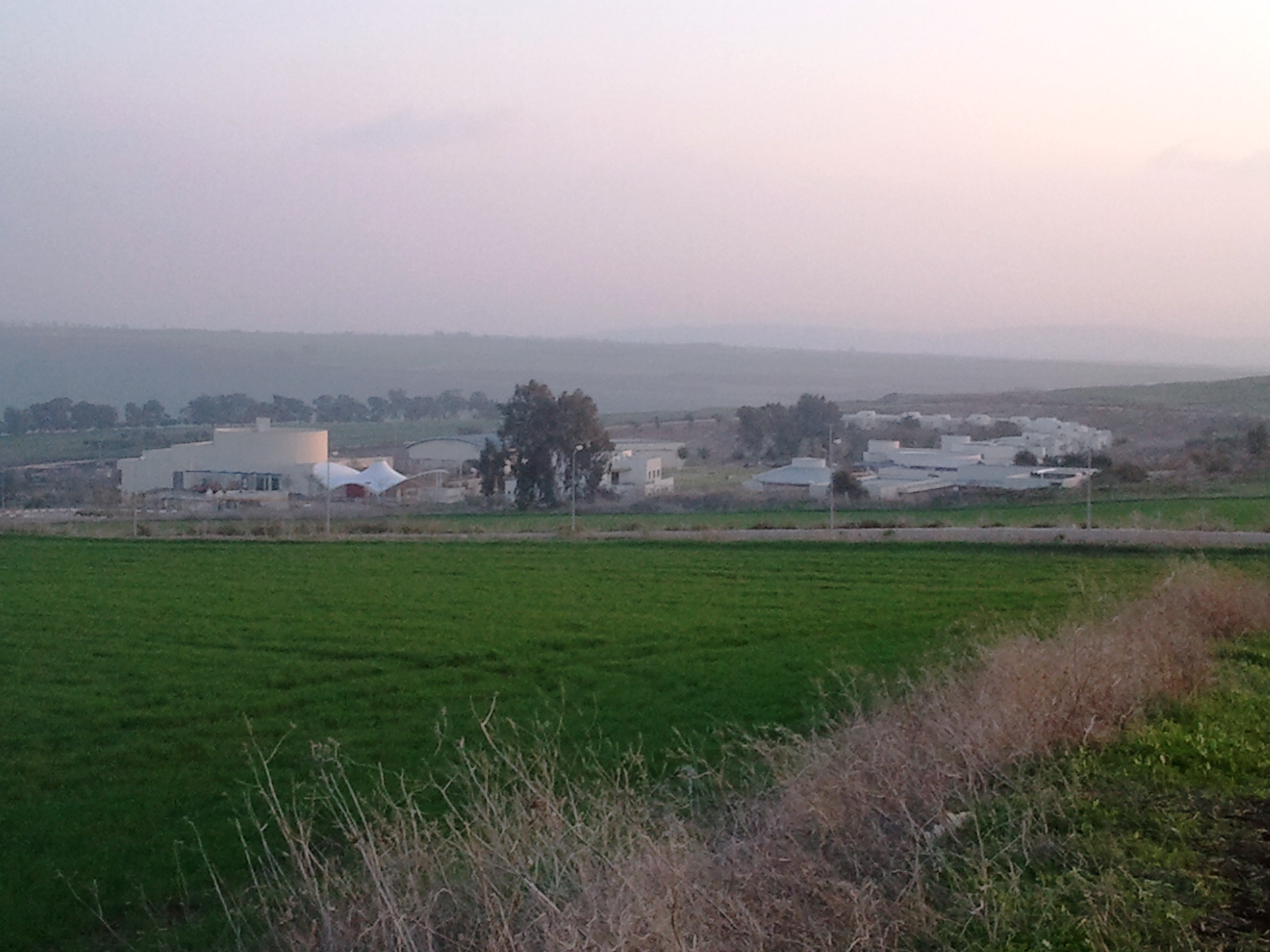 כפר נהר הירדן הוא כפר נופש לשירותם, ללא תמורה, של ילדים בני 9 עד 18, מישראל, מהרשות הפלסטינית ומירדן, החולים במחלות קשות ומסכנות חיים.